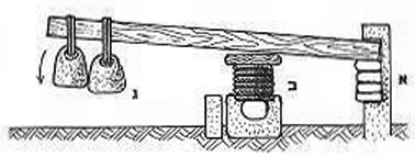 בית בד